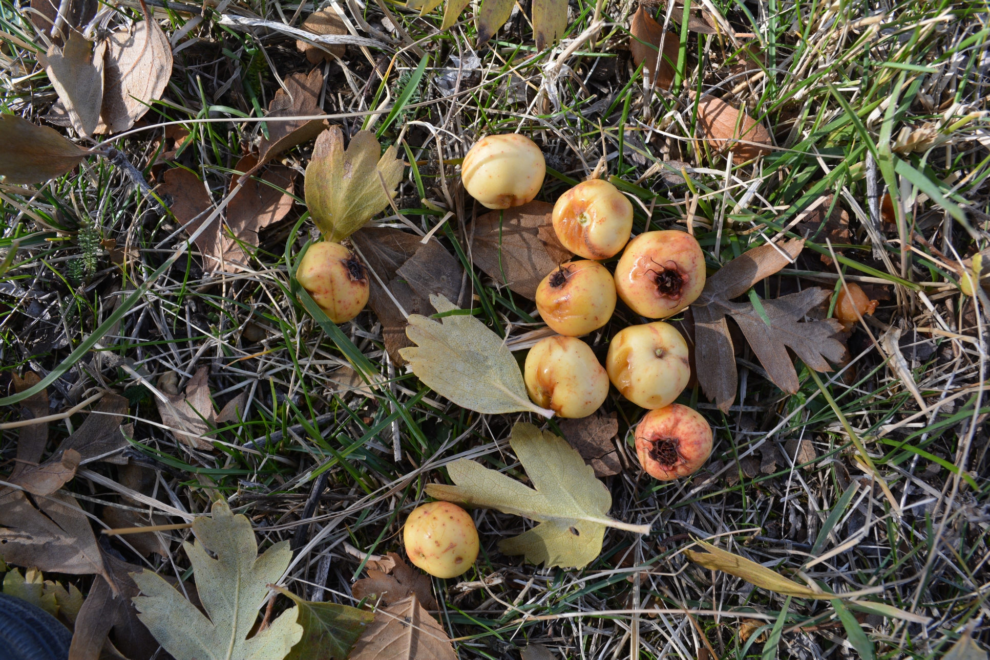 Խոսրովի անտառ